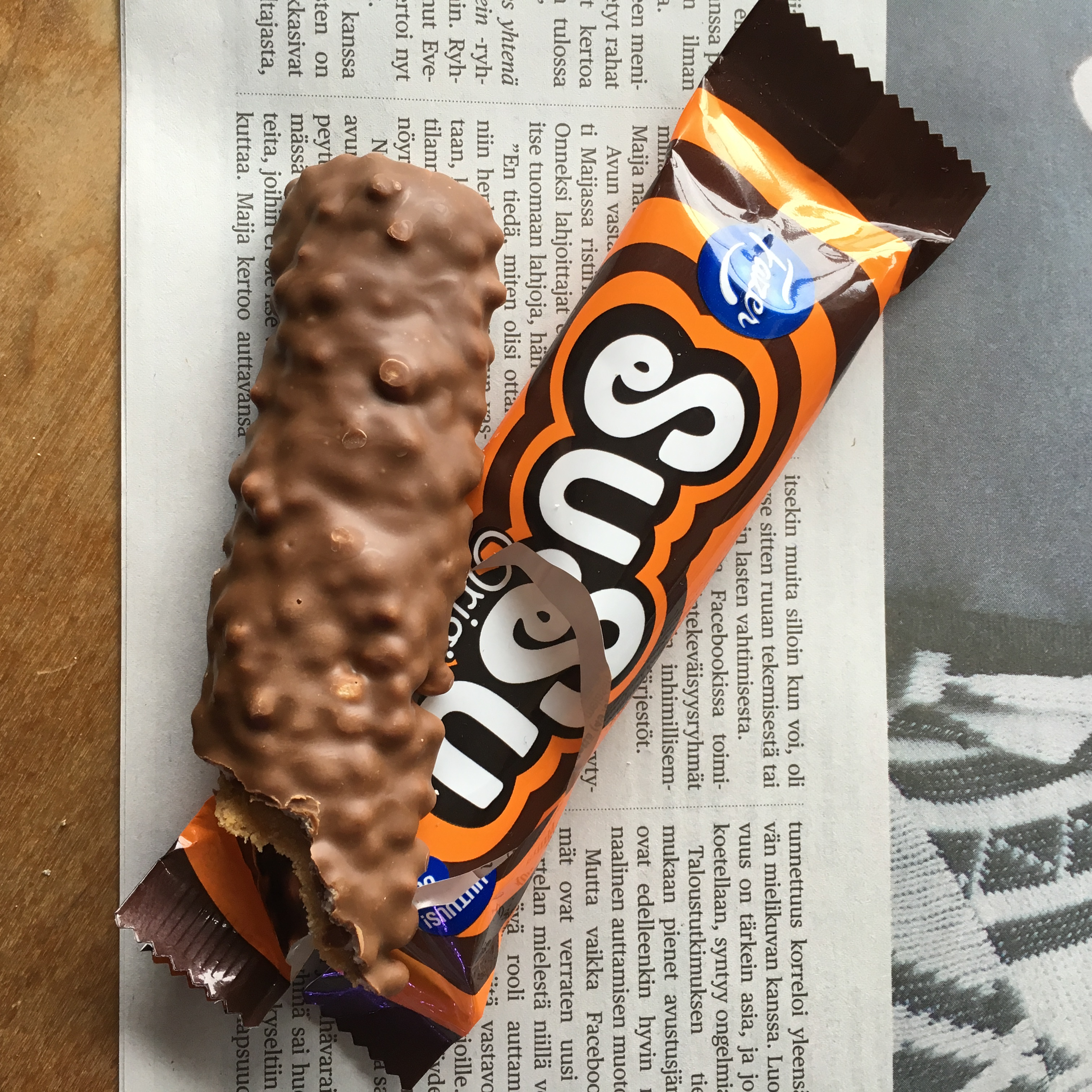 Fazerin Susu suklaa